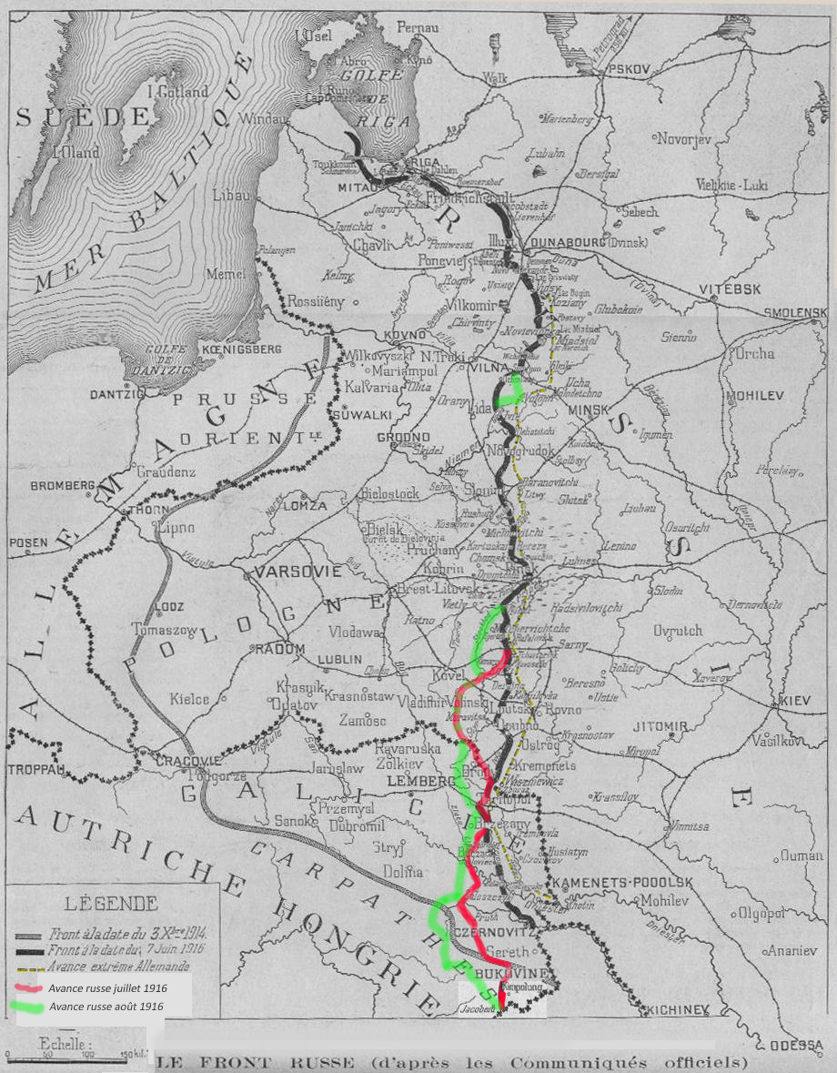 carte_de_l'offensive_Broussilov à partir de celles publiées par Le Pays de france.